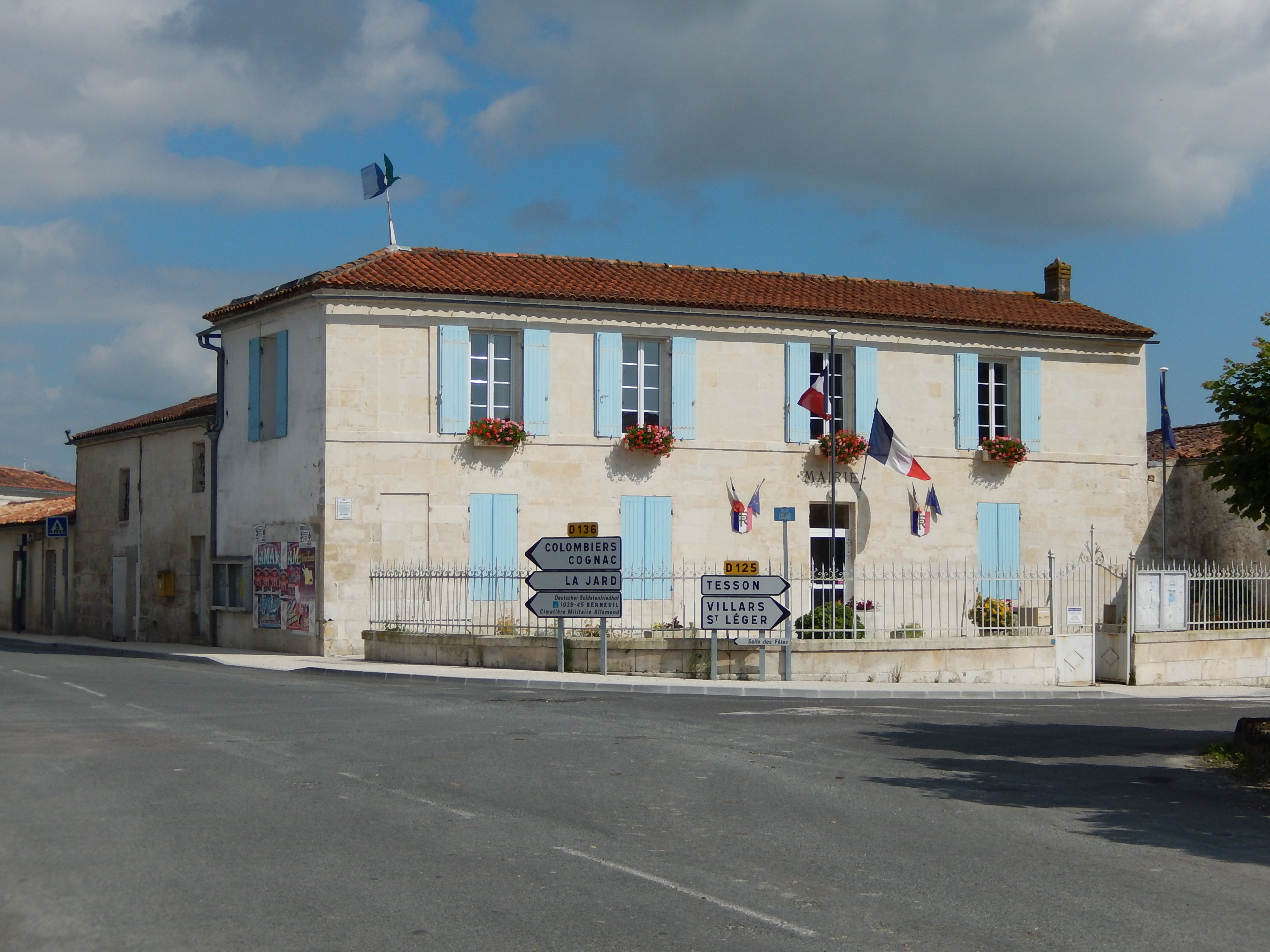 La mairie de Berneuil (Charente-Maritime, France).